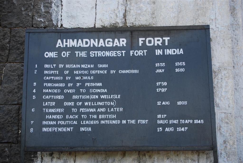 Ahmednagar fort signage